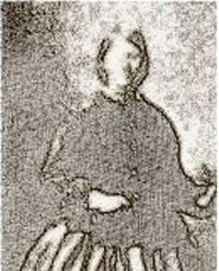 Mercedes Neira Ortiz de Nuñez